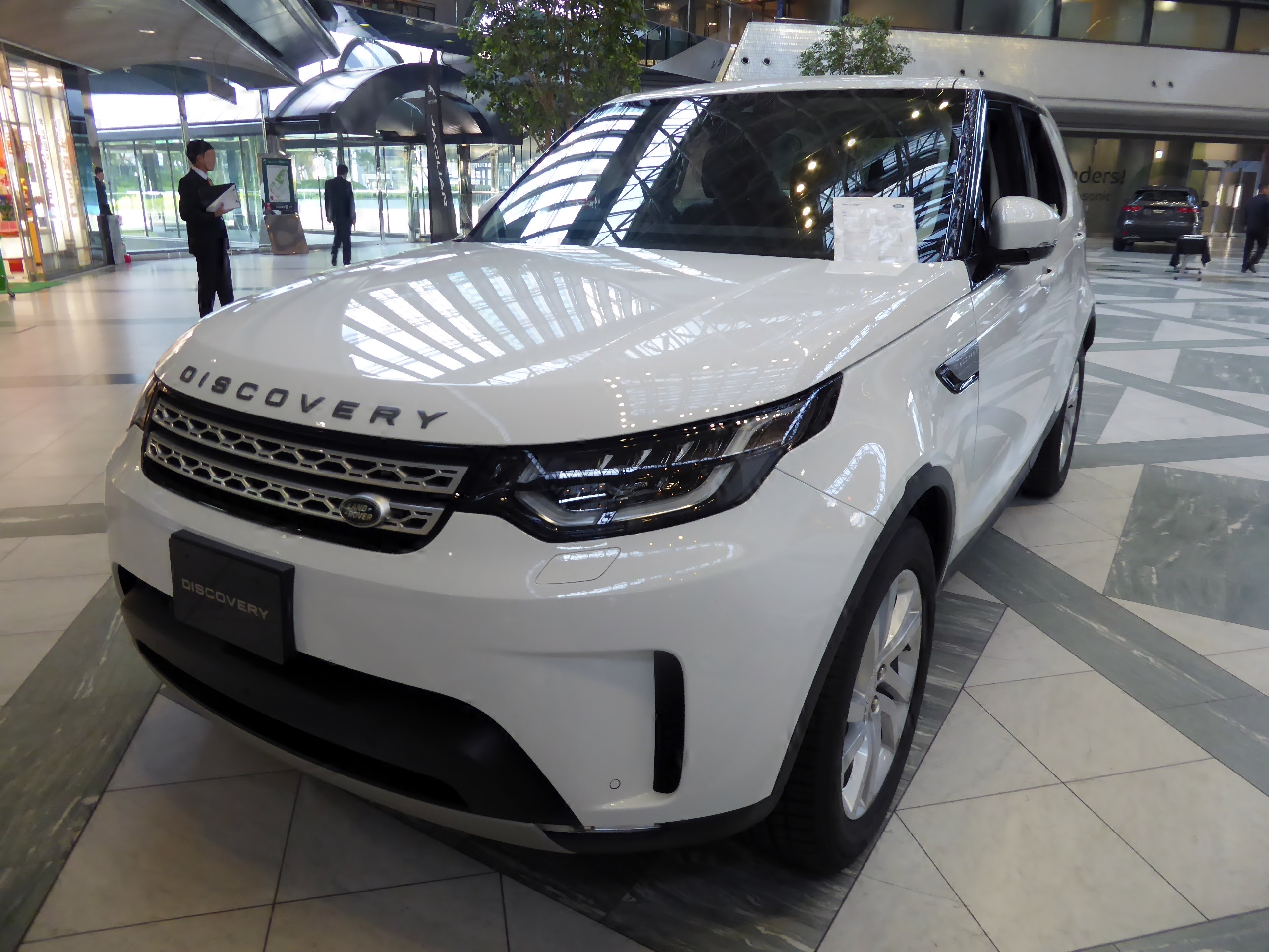 ABA-LR3VA型ランドローバー・ディスカバリーHSEをフロントから撮影。